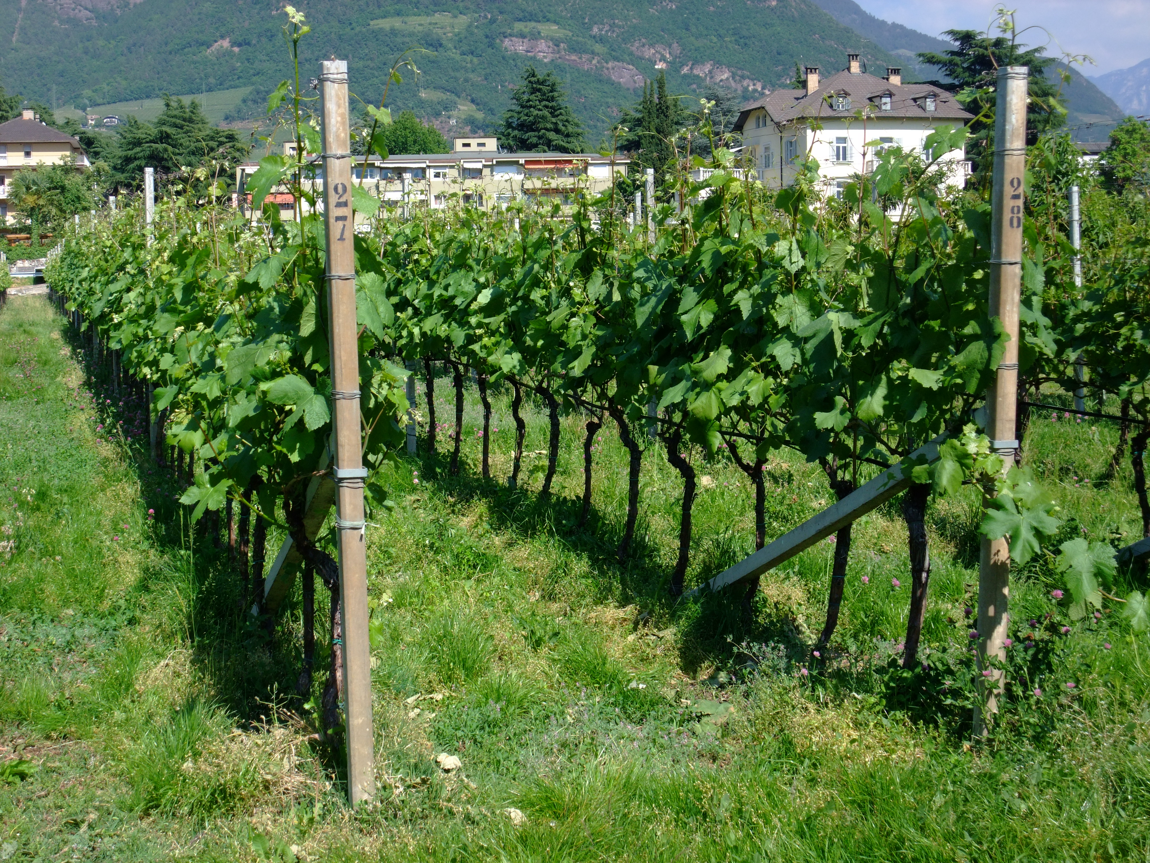 Spaliererziehung in Südtirol, Sorte Lagrein